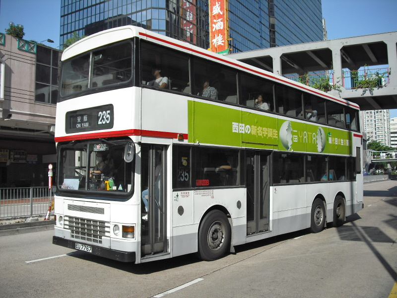 九巴235線，攝於荃灣力生廣場對出巴士站